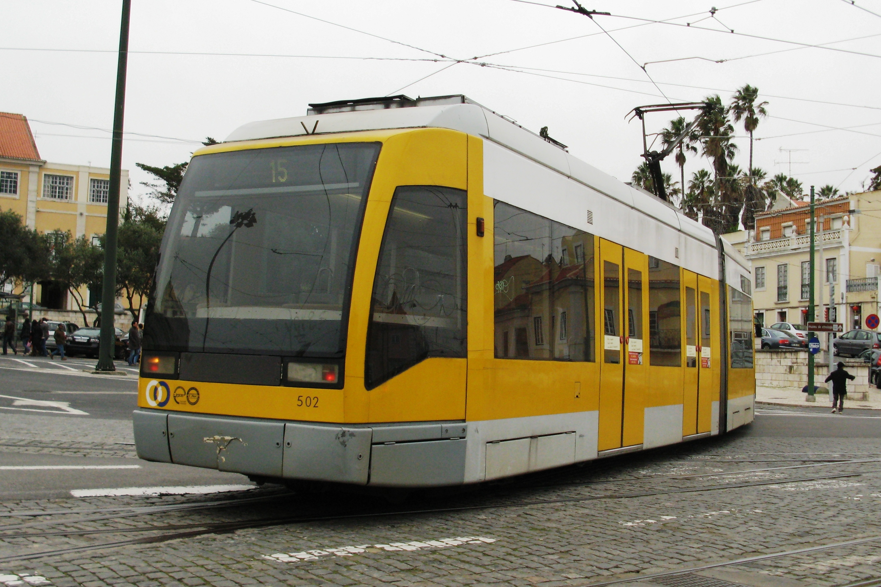 Modernen Tram zu Lissabon am Februar 2010. Lissabon